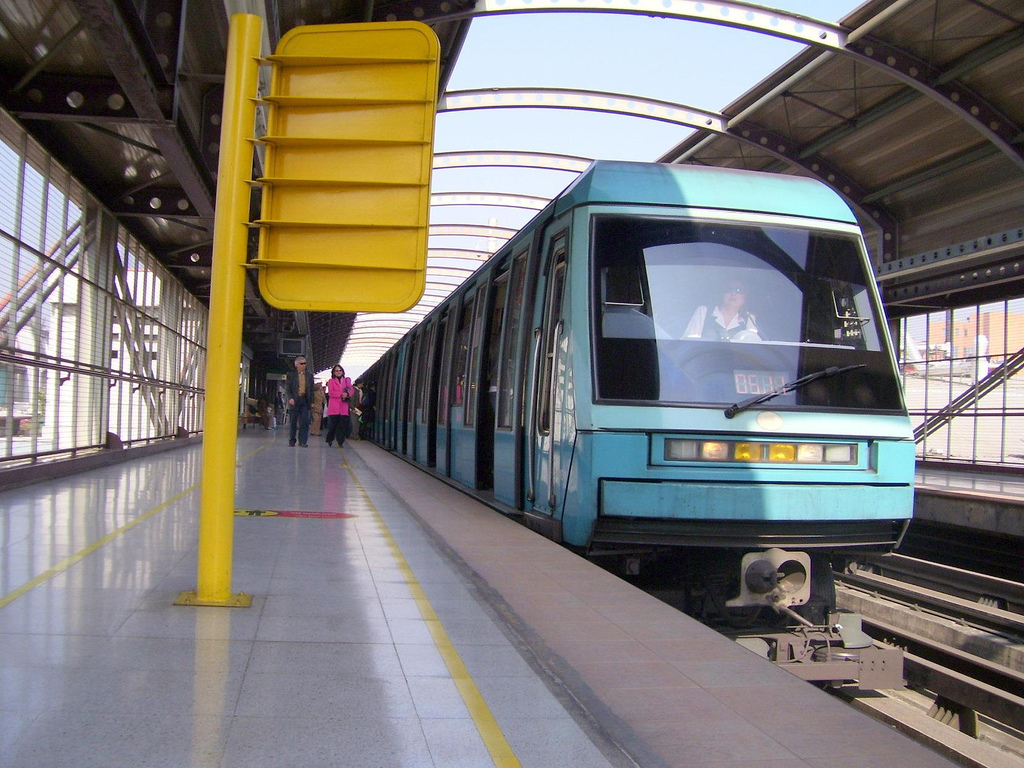 Estación Ñuble, Línea 5 de Metro de Santiago (Chile)